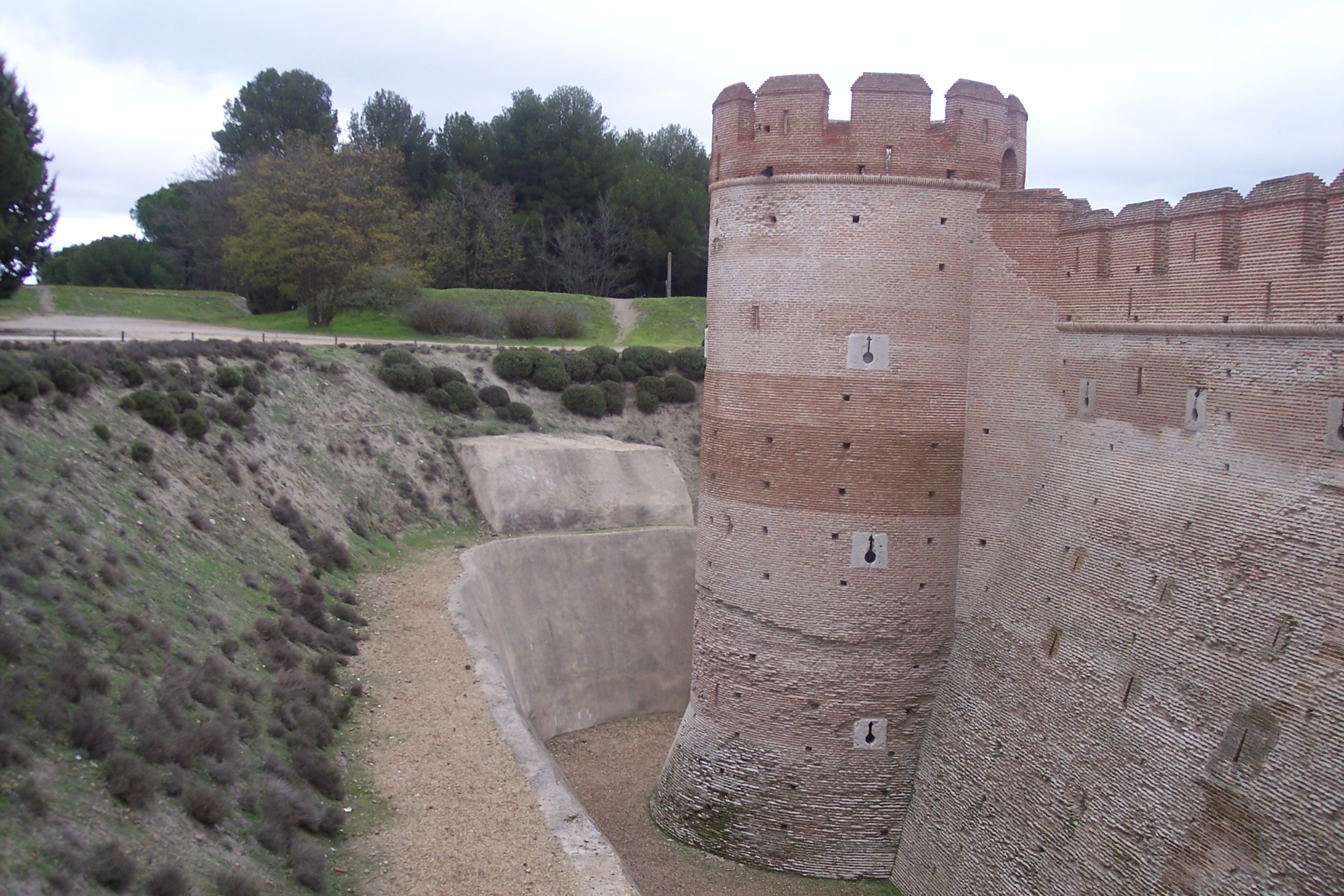 Foso del Castillo de la Mota en Medina del Campo, Valladolid (España).